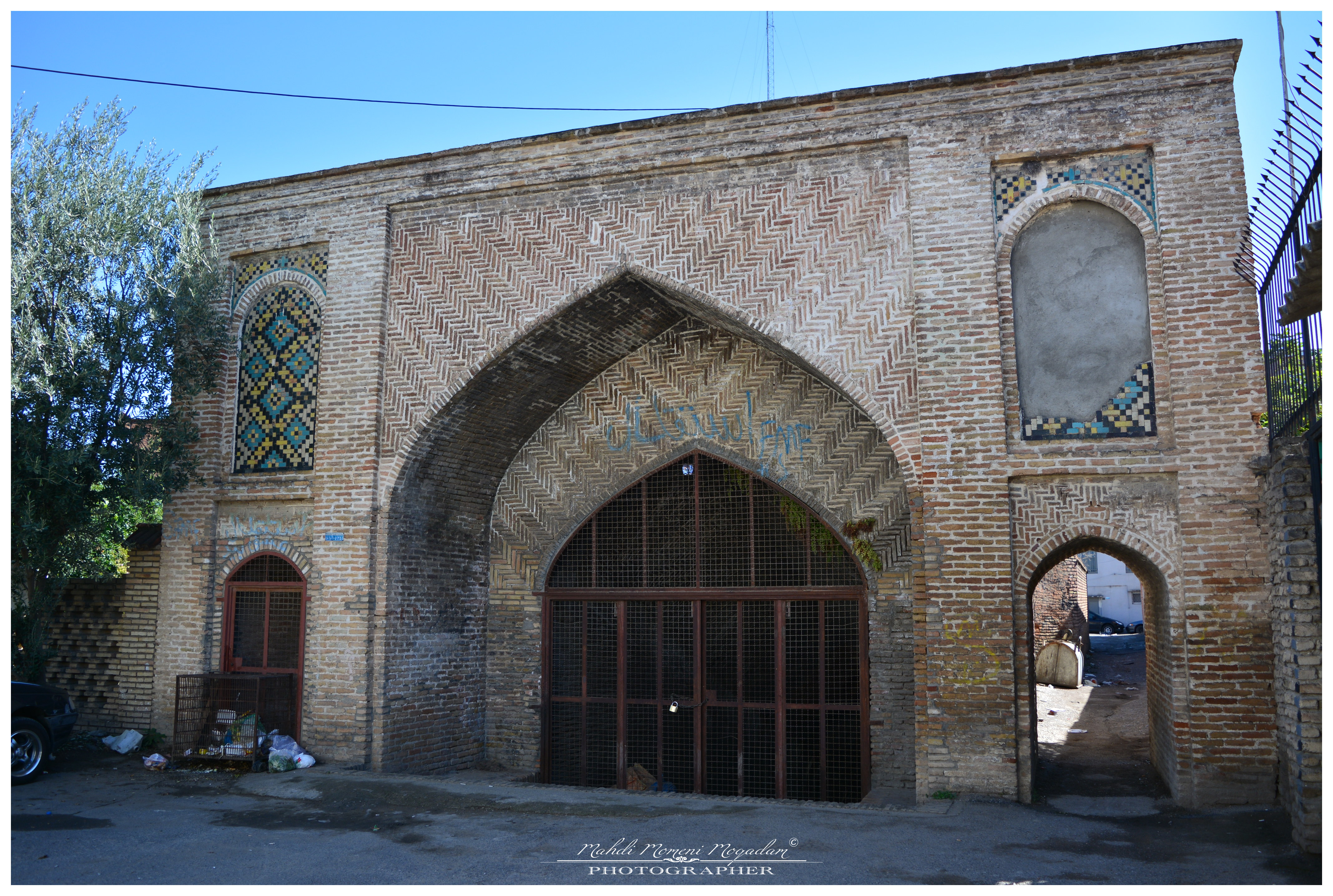 آب‌انبار نو